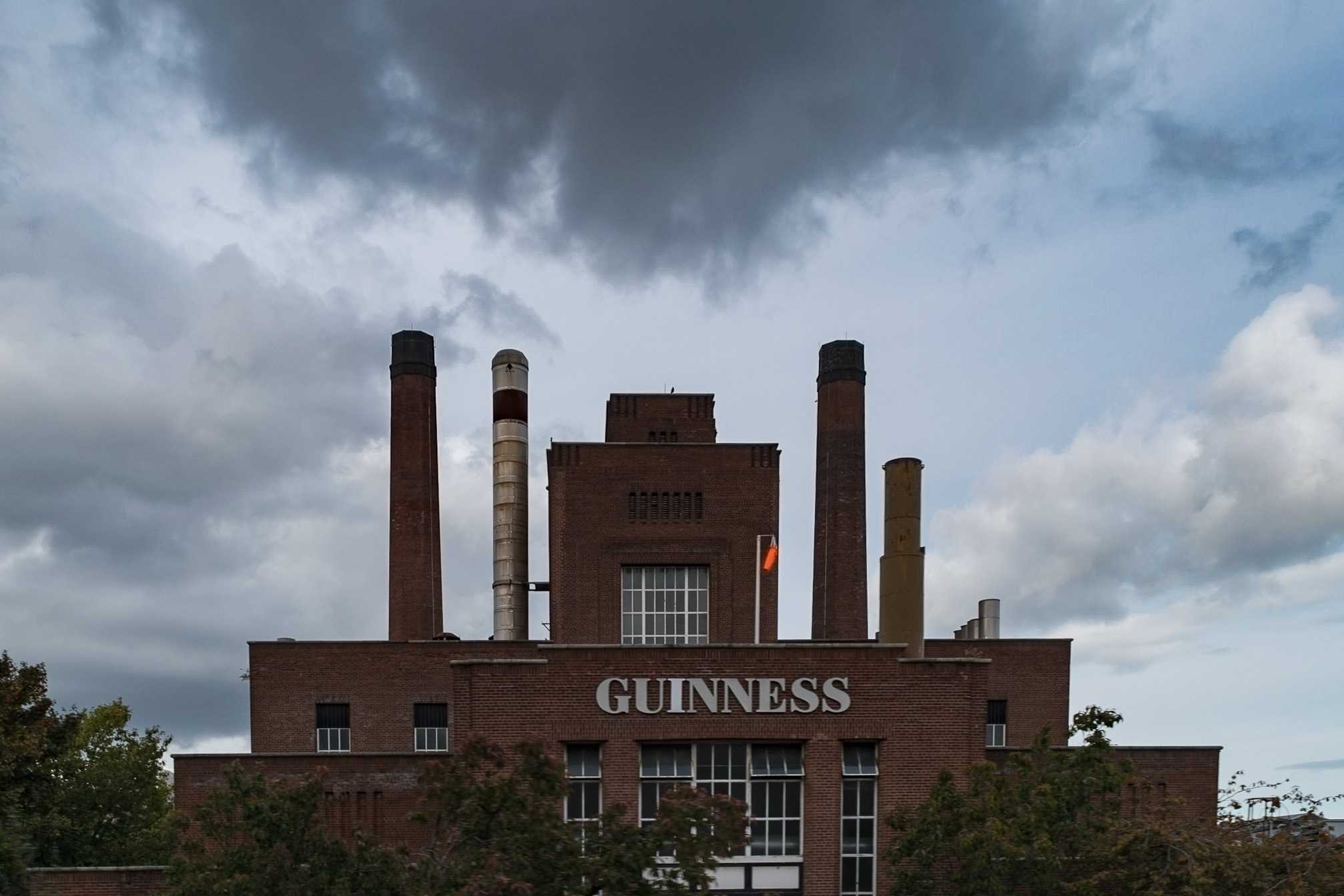 Guinness Brauerei Dublin Irland